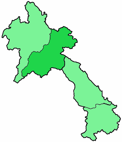 Mappa del Vicariato Apostolico cattolico di Vientiane, in Laos. Lavoro personale, eseguito a partire da questa immagine di Commons. Fonte per i confini delle diocesi: Guida delle missioni cattoliche 2005, a cura della Congregatio pro gentium evangelizatione, Roma, Urbaniana University Press, 2005. Categoria:Chiesa cattolica in Laos